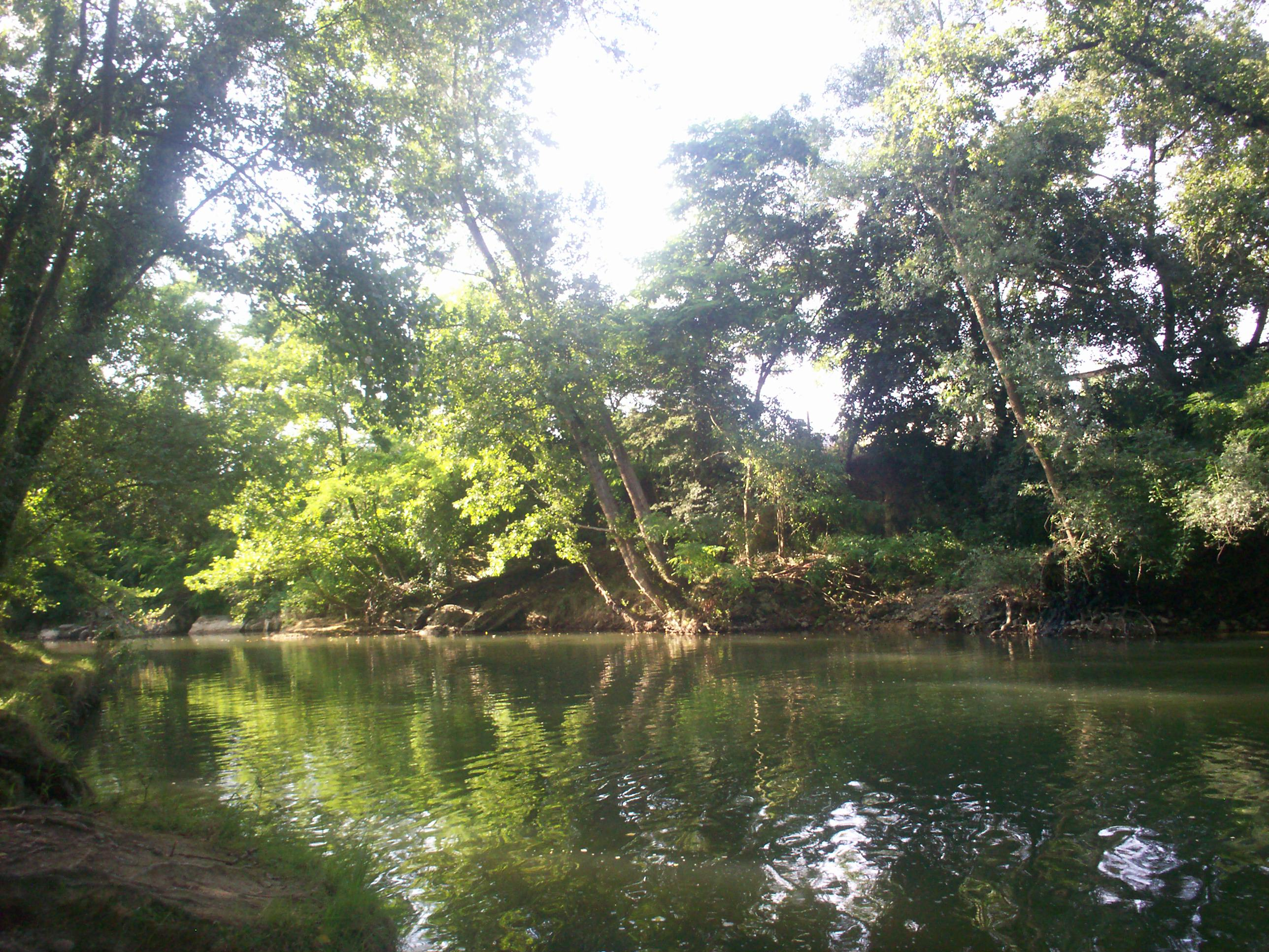 La Baïsa à Abidos.